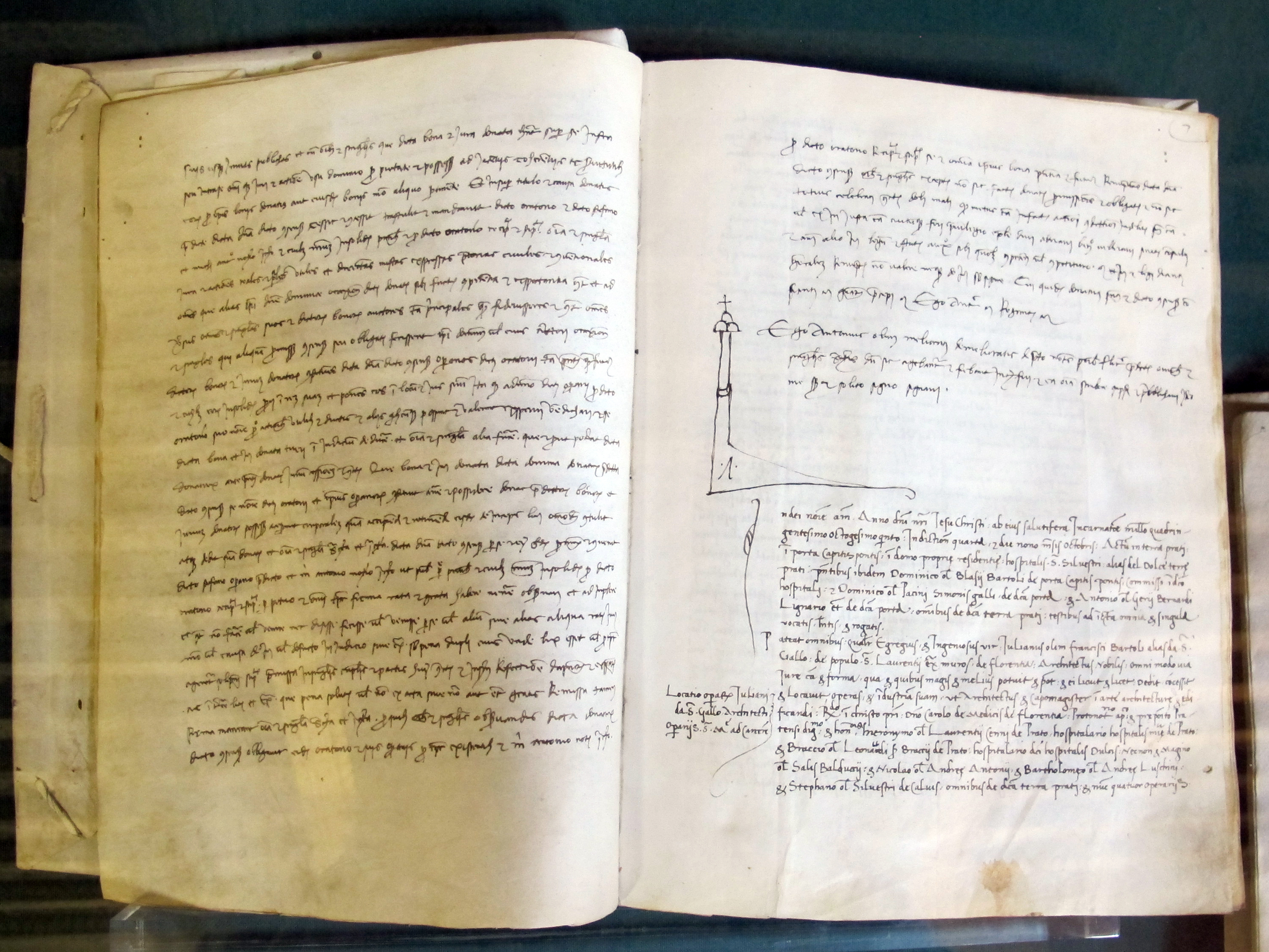 Palazzo Datini, Prato